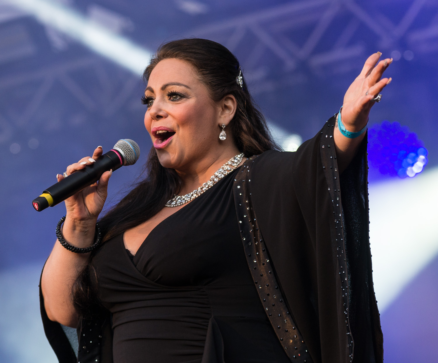 Anna Book under "Eurovision i Kungsträdgården" inför Eurovision Song Contest i Stockholm i maj 2016.